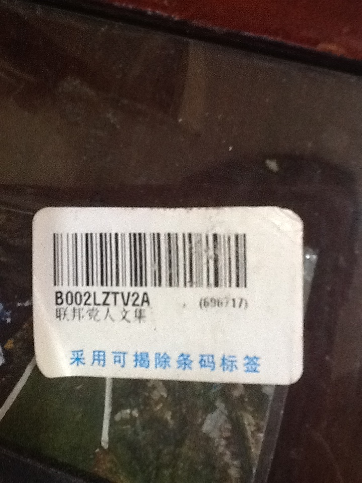 一般的條碼一旦貼上便很難移除，而這種條碼利用特殊技術即使時間過久，也不會不容易移除下來。